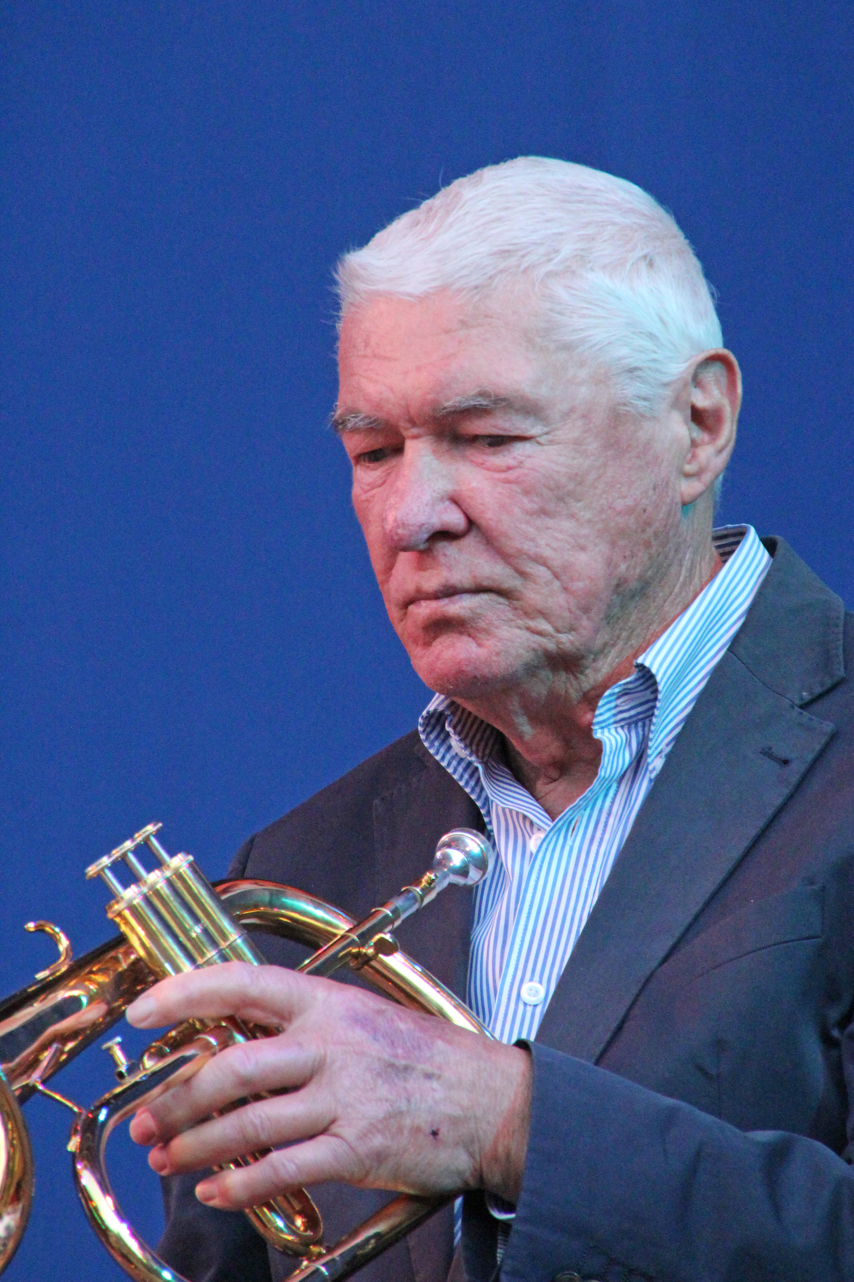 Bildinhalt: Manfred Schoof bei einem Auftritt der Gruppe Quartetto Trionfale im Frankfurter Palmengarten Aufnahmeort: Frankfurt am Main, Deutschland Die dargestellte Person wurde bei einem öffentlichen Auftritt fotografiert.